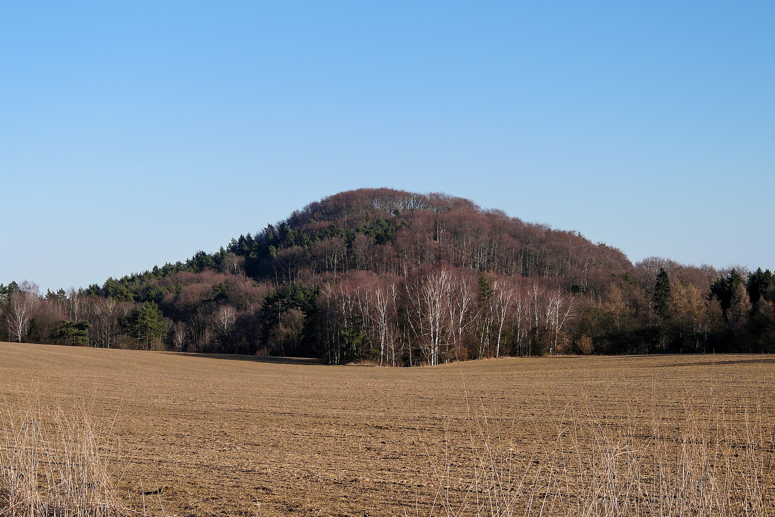 Jestřábí vrch od severozápadu